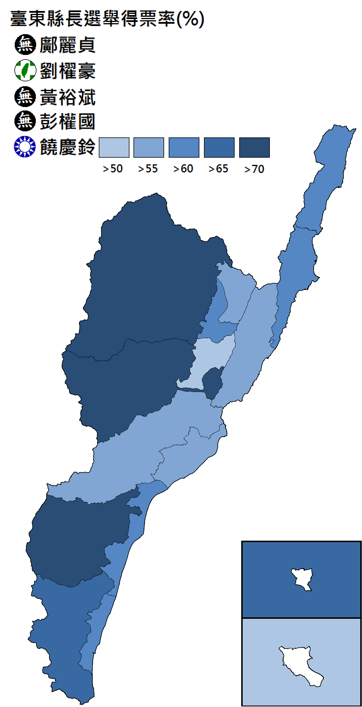 台東縣長選舉得票分布。